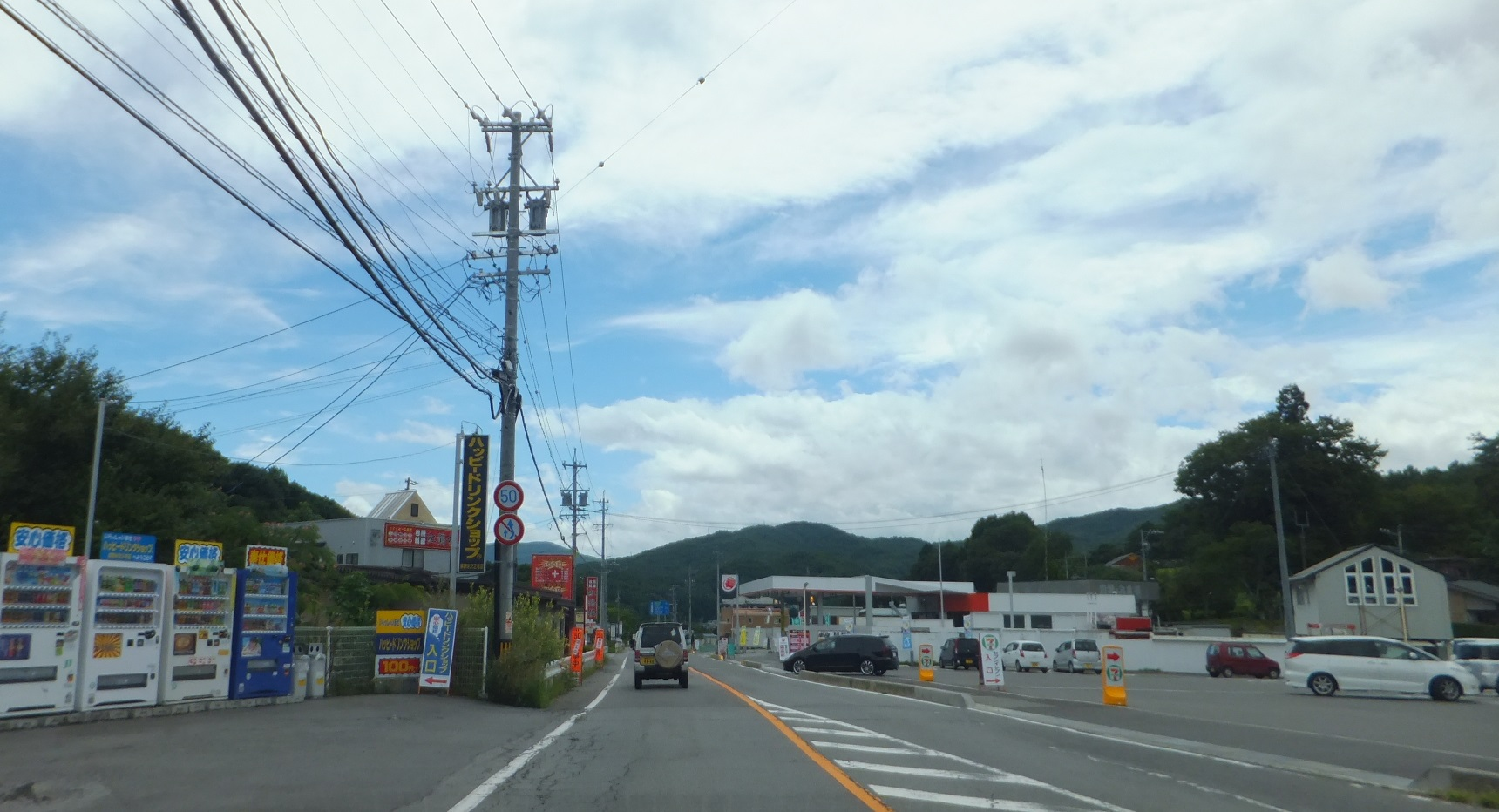 長野県茅野市米沢 長野県道192号茅野停車場八子ヶ峰公園線